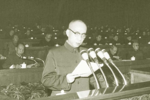 李富春在第二届全国人大四次会议上作报告